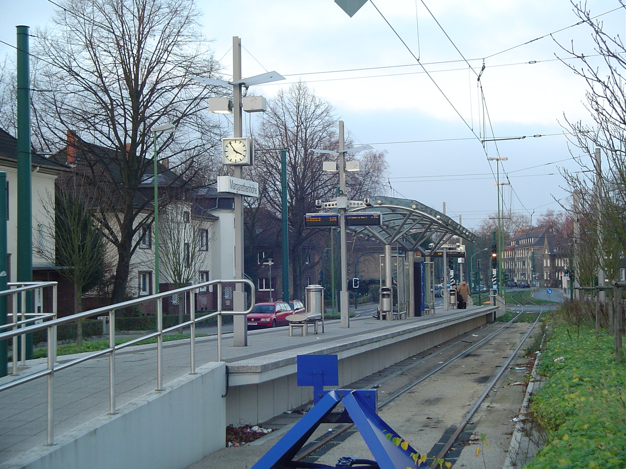 Essen Stadtbahn